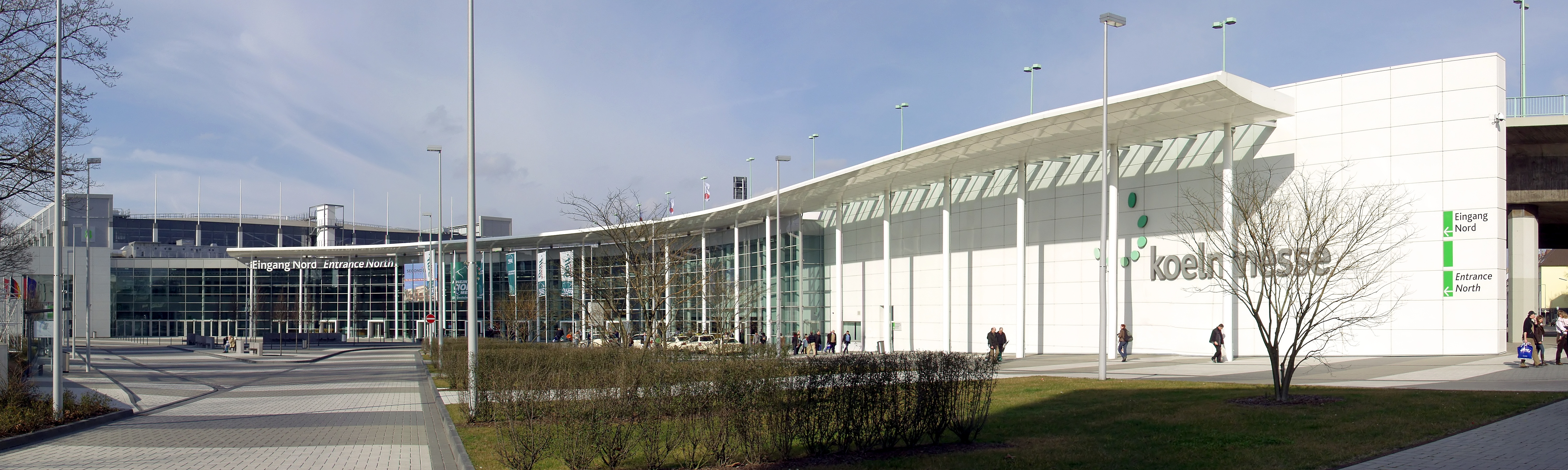 Nordeingang zur Koelnmesse, Halle 8